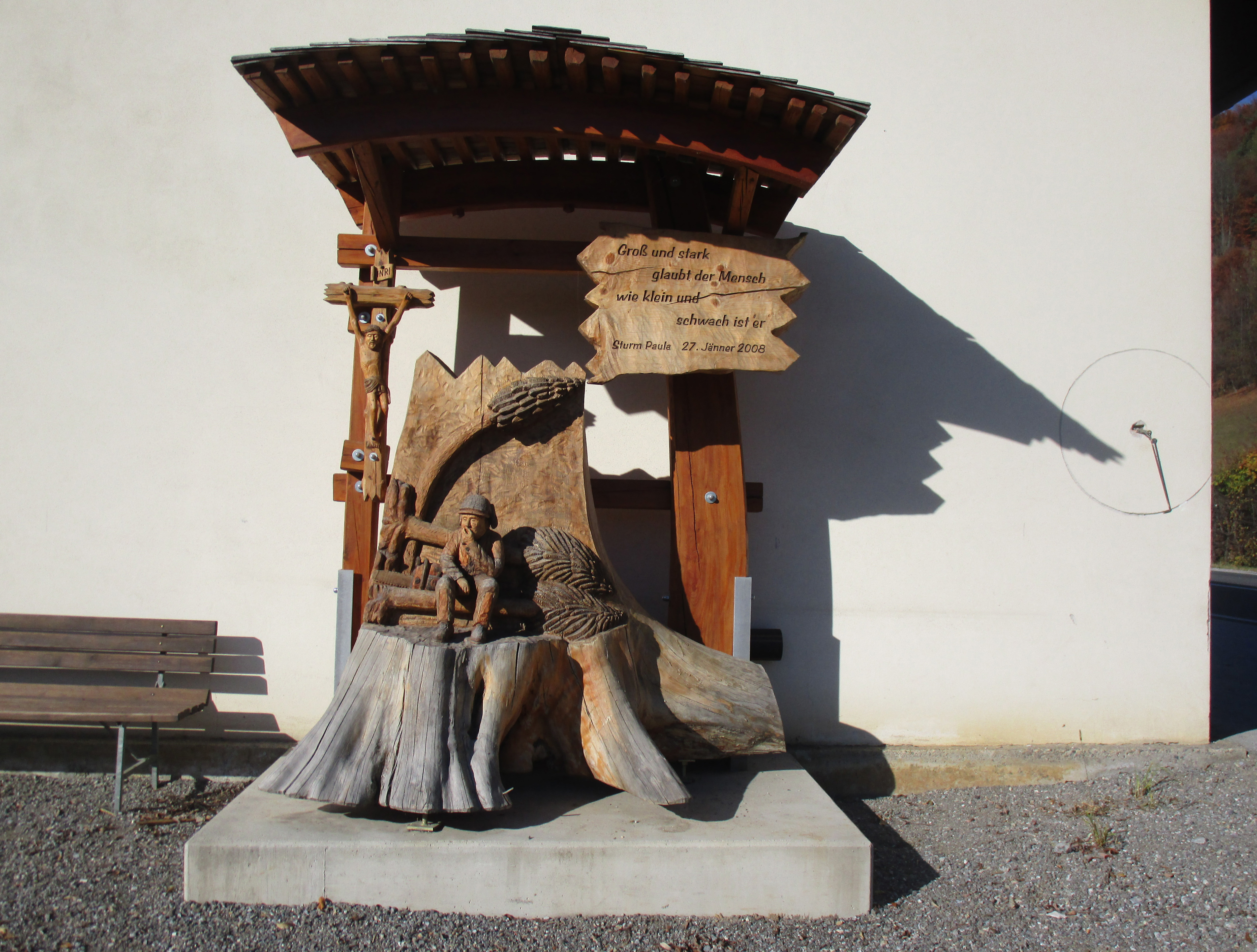 Holzschnitzerei Windbruch zum Gedenken an Sturm Paula im Ortszentrum von Naas "Groß und stark, glaubt der Mensch, wie klein und schwach ist er, Sturm Paula, 27. Jänner 2008